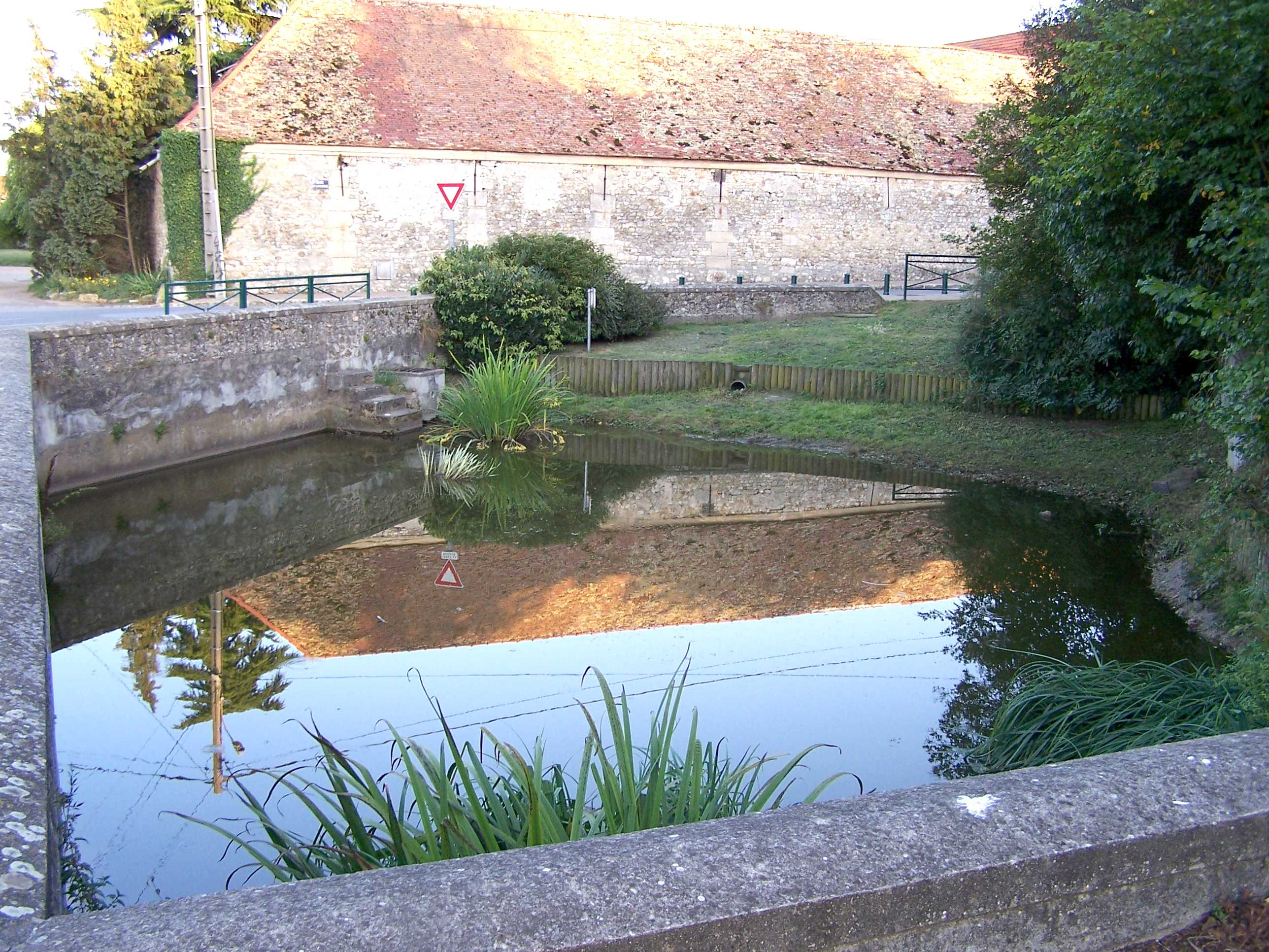 Abreuvoir de Saint-Germain-de-la-Grange (Yvelines, France)